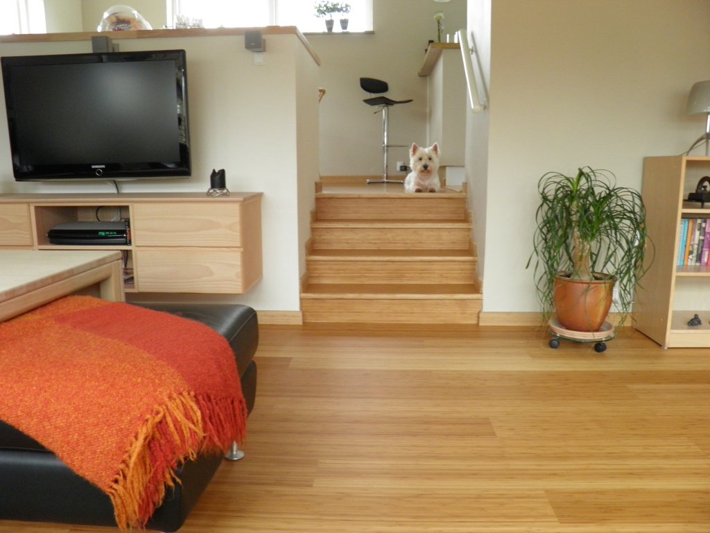 Gulvet er afslebet og behandlet med 2 lag hård olie.